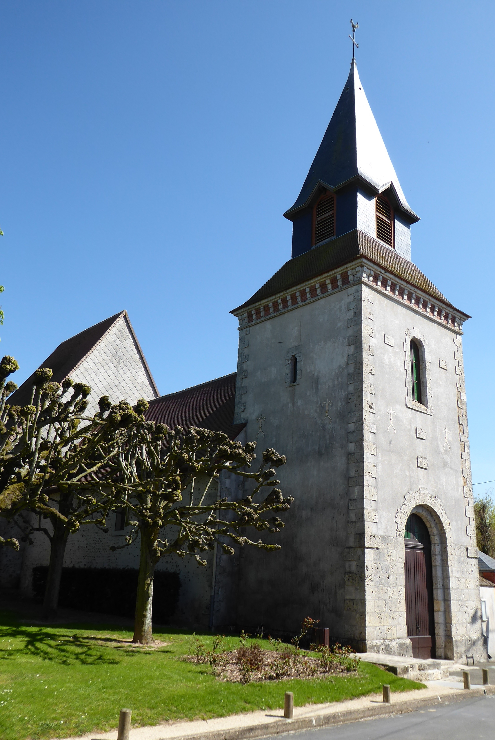 église Saint-Lubin, Coltainville, Eure-et-Loir (France).